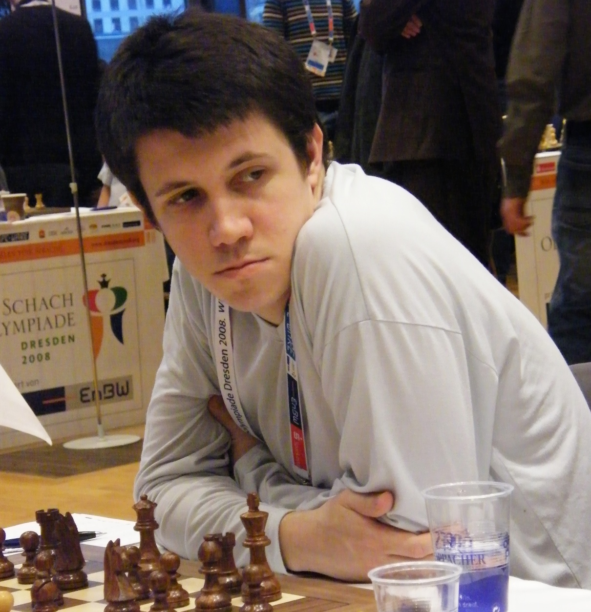 Diego Flores bei der 38. Schacholympiade in Dresden 2008